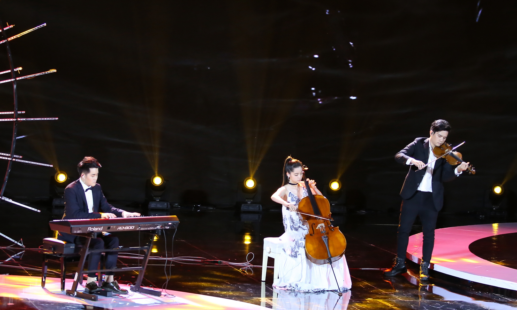 欧阳娜娜 微博电影之夜